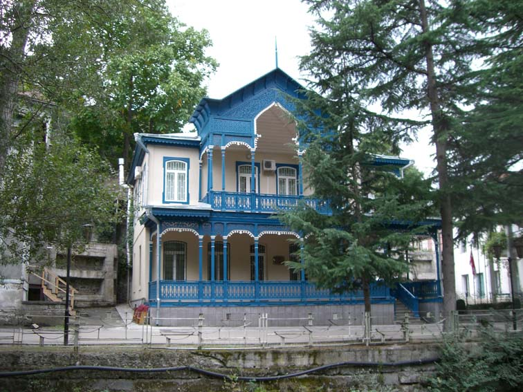 Borjomi